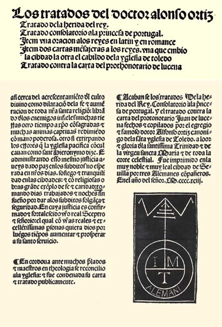 Portada y colofón de los Tratados del Doctor Alfonso Ortiz (1493)